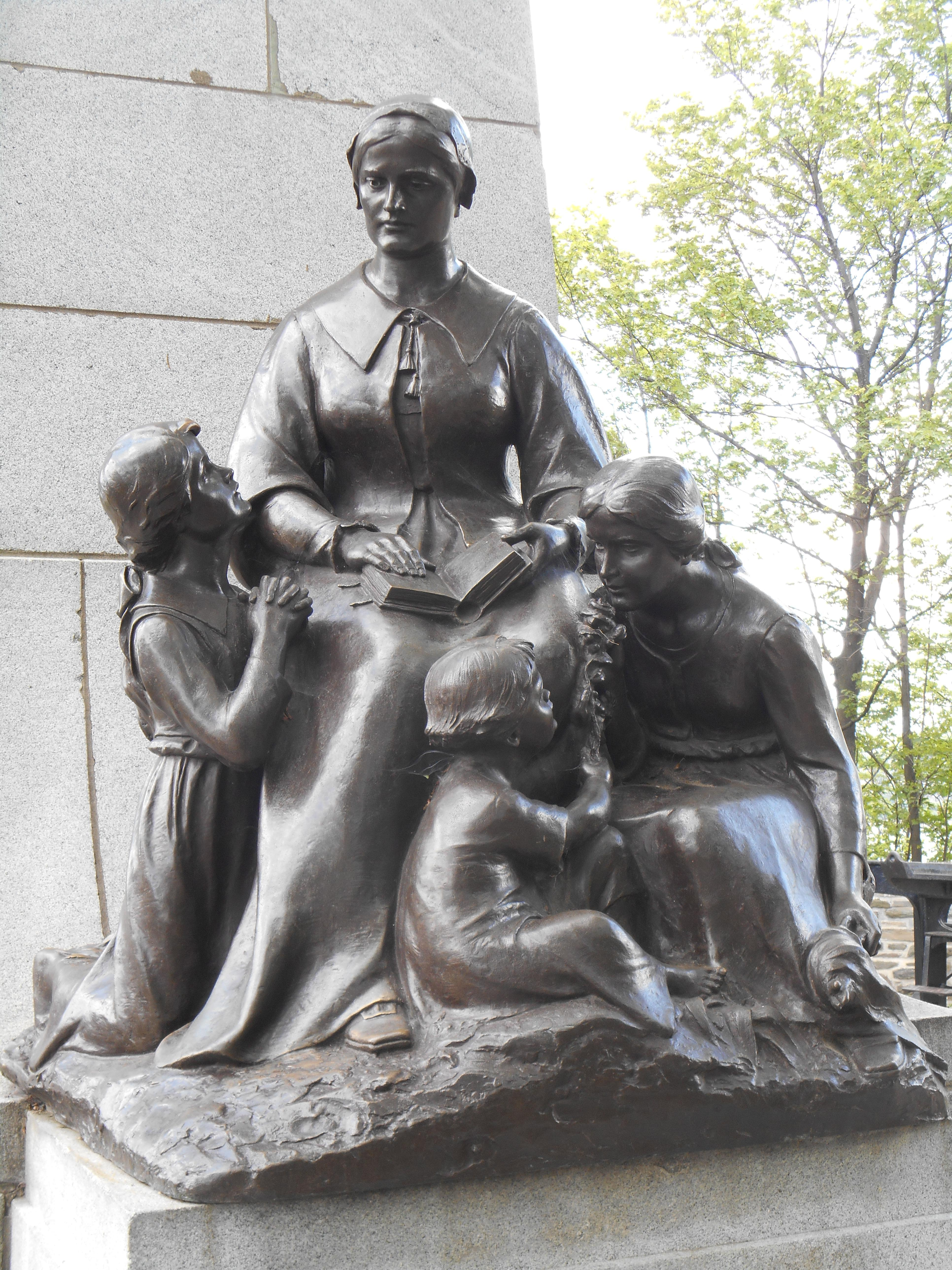 « Le monument Louis-Hébert (1575-1627) avait été initialement installé à la place de l'Hôtel de Ville, où il fut dévoilé le 3 septembre 1918, pour commémorer le troisième centenaire de l'arrivée en 1617 de cet apothicaire français qui est devenu le "premier colon canadien". Le monument fut démonté en 1971 et ultérieurement déménagé dans le parc Montmorency, au sommet de la côte de la Montagne. Les terres de Louis Hébert s'étendaient sur le site actuel de la Basilique Notre-Dame de Québec, du Séminaire, de l'Hôtel-Dieu, et des rues Hébert et Couillard. La statue en bronze de Louis Hébert au sommet du monument, et les personnages des hauts-reliefs en bronze reposant les socles, sont l'œuvre du sculpteur montréalais Alfred Laliberté. L'artiste a représenté Louis Hébert élevant une poignée d'épis de blé vers le ciel, offrant au Seigneur sa première récolte. Les personnages des hauts-reliefs sont : à droite, Marie Rollet, épouse Louis Hébert qui, assise au milieu de ses trois enfants, tient un livre et les instruit; à gauche, une statue du défricheur Guillaume Couillard, son gendre, appuyé sur une charrue. Le piédestal est orné de festons, d'écussons, et d'inscriptions incluant les noms des quarante-sept premiers colons de Québec. »